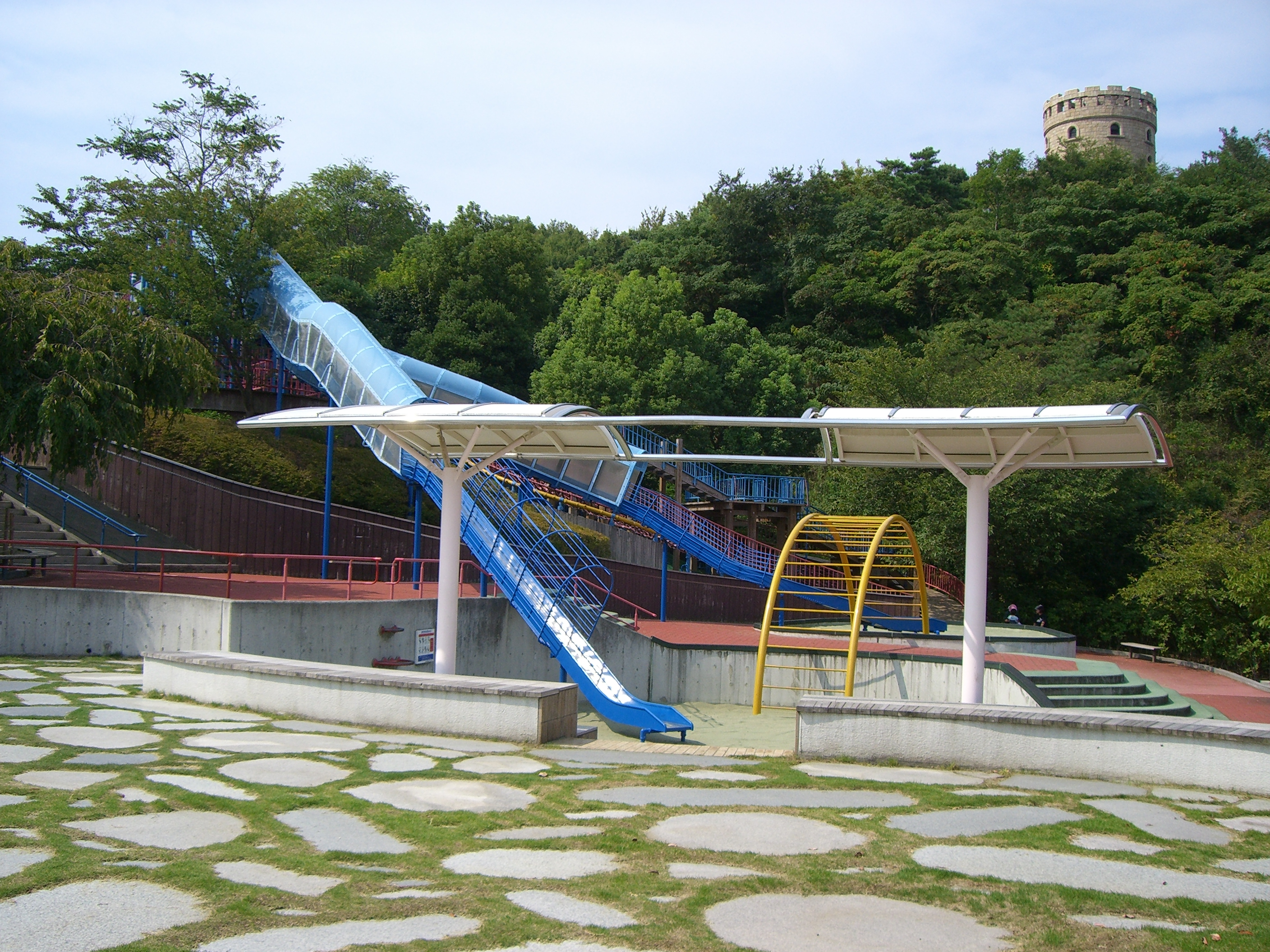 松山総合公園にある幼児用遊具（無料）。